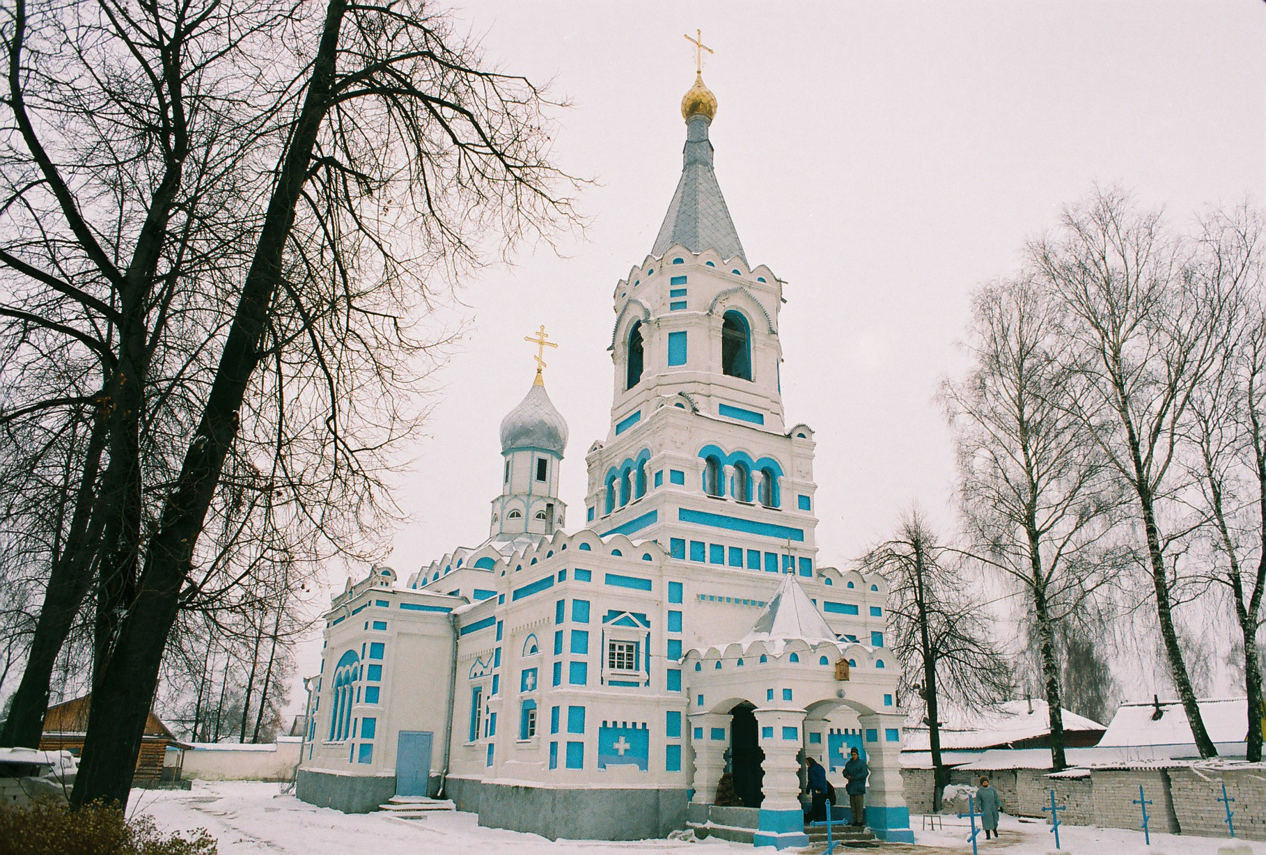 Cerkiew św. Eliasza w Orszy